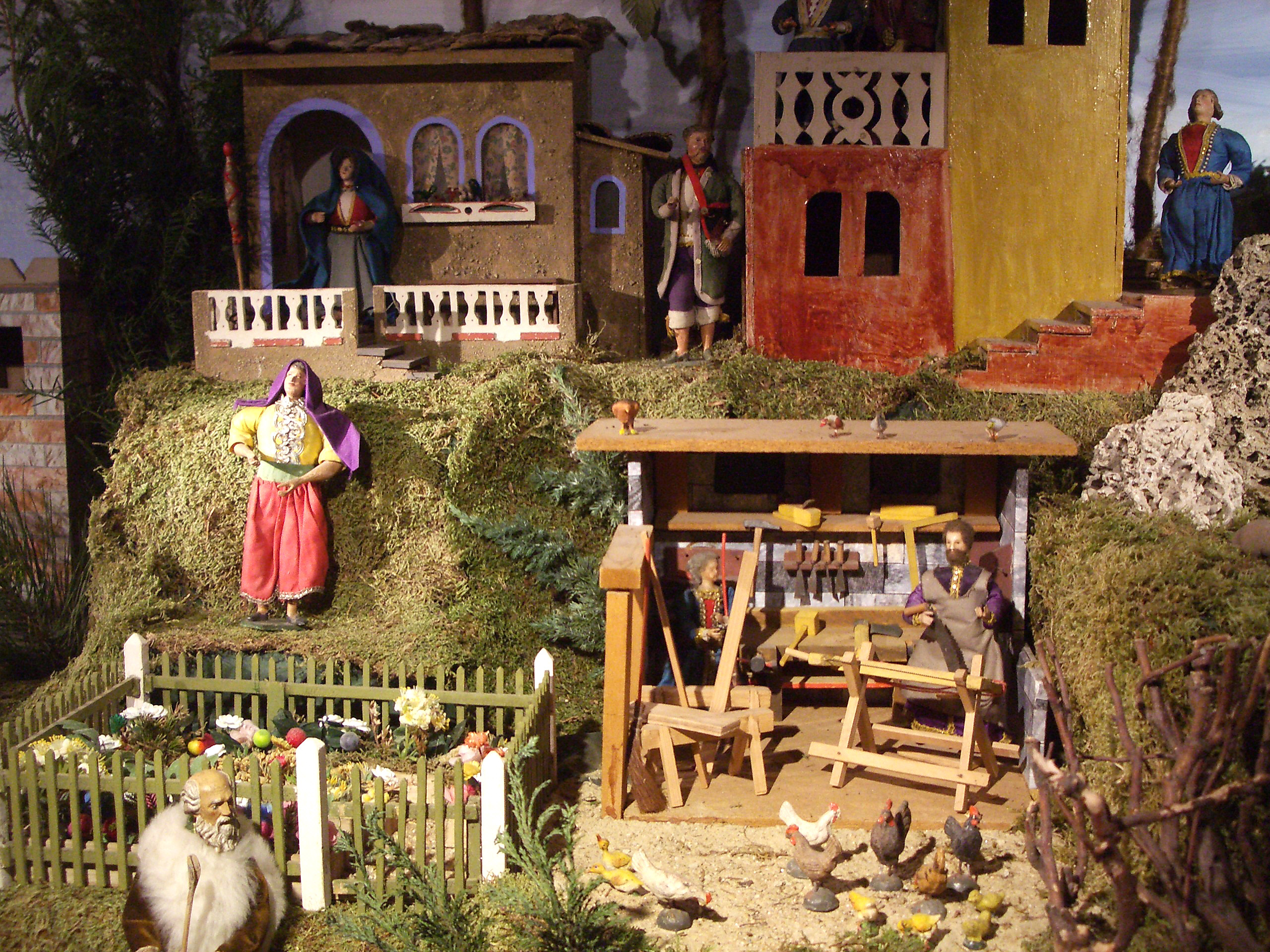 Krippe aus Klosterwald (aufgestellt in der Jesuitenkirche Mindelheim): Das Haus Nazareth